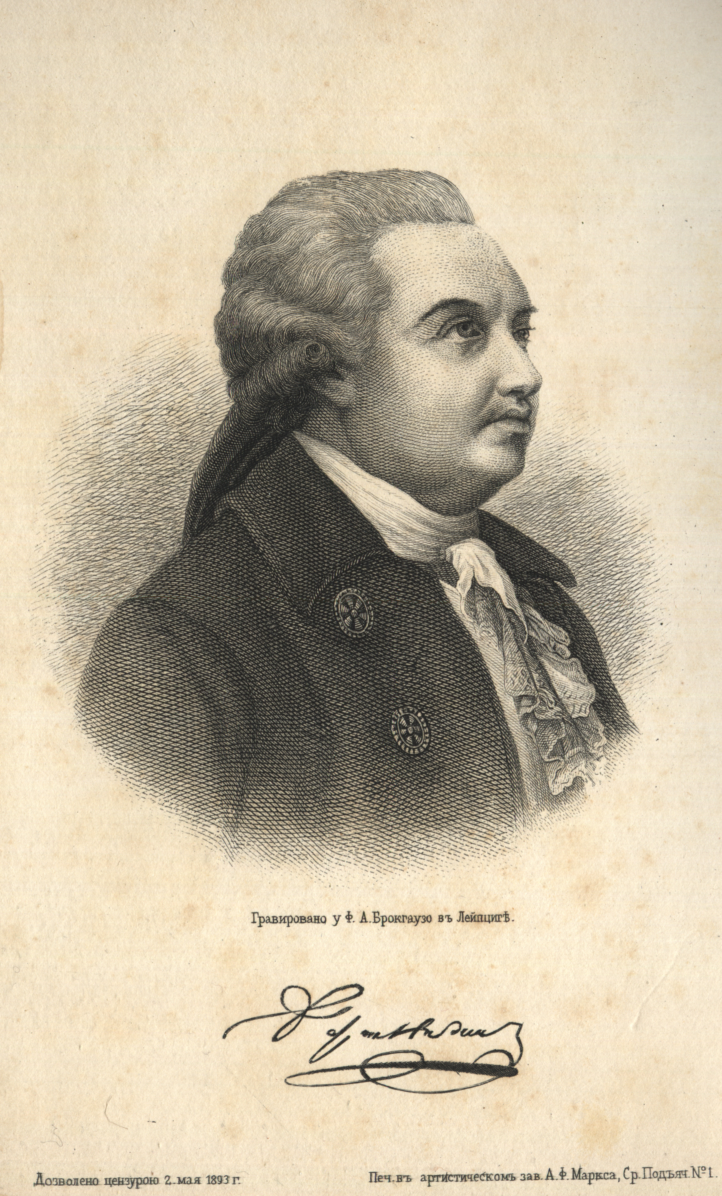 Denis Ivanovich Fonvizin (Russian: Денис Иванович Фонвизин), full page